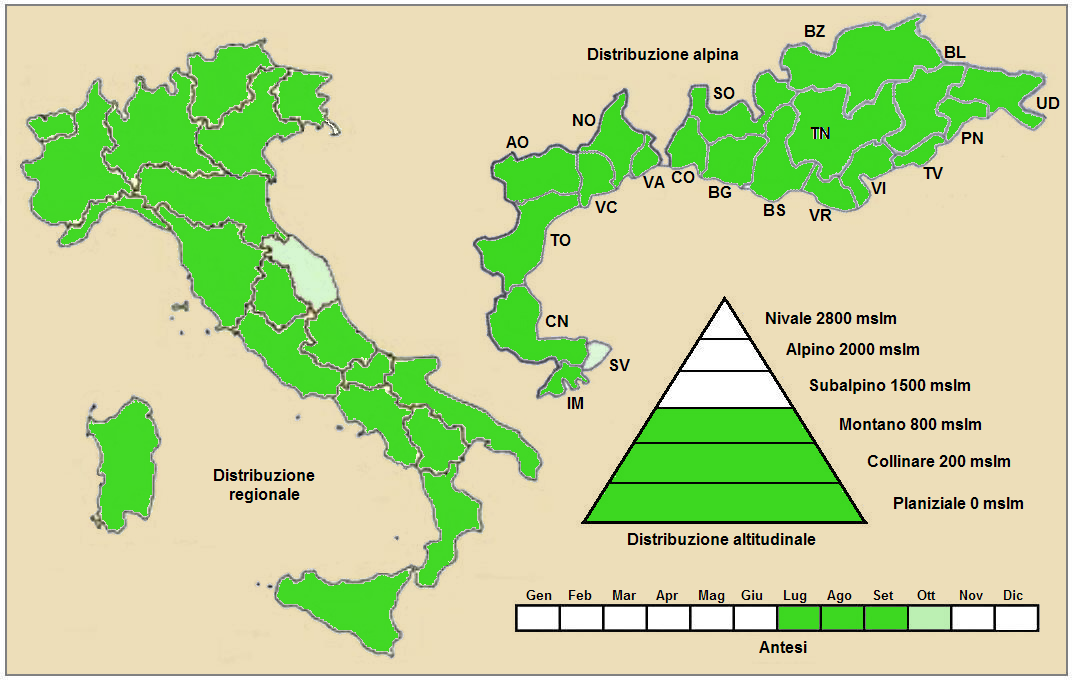 Artemisia vulgaris - Distribuzione